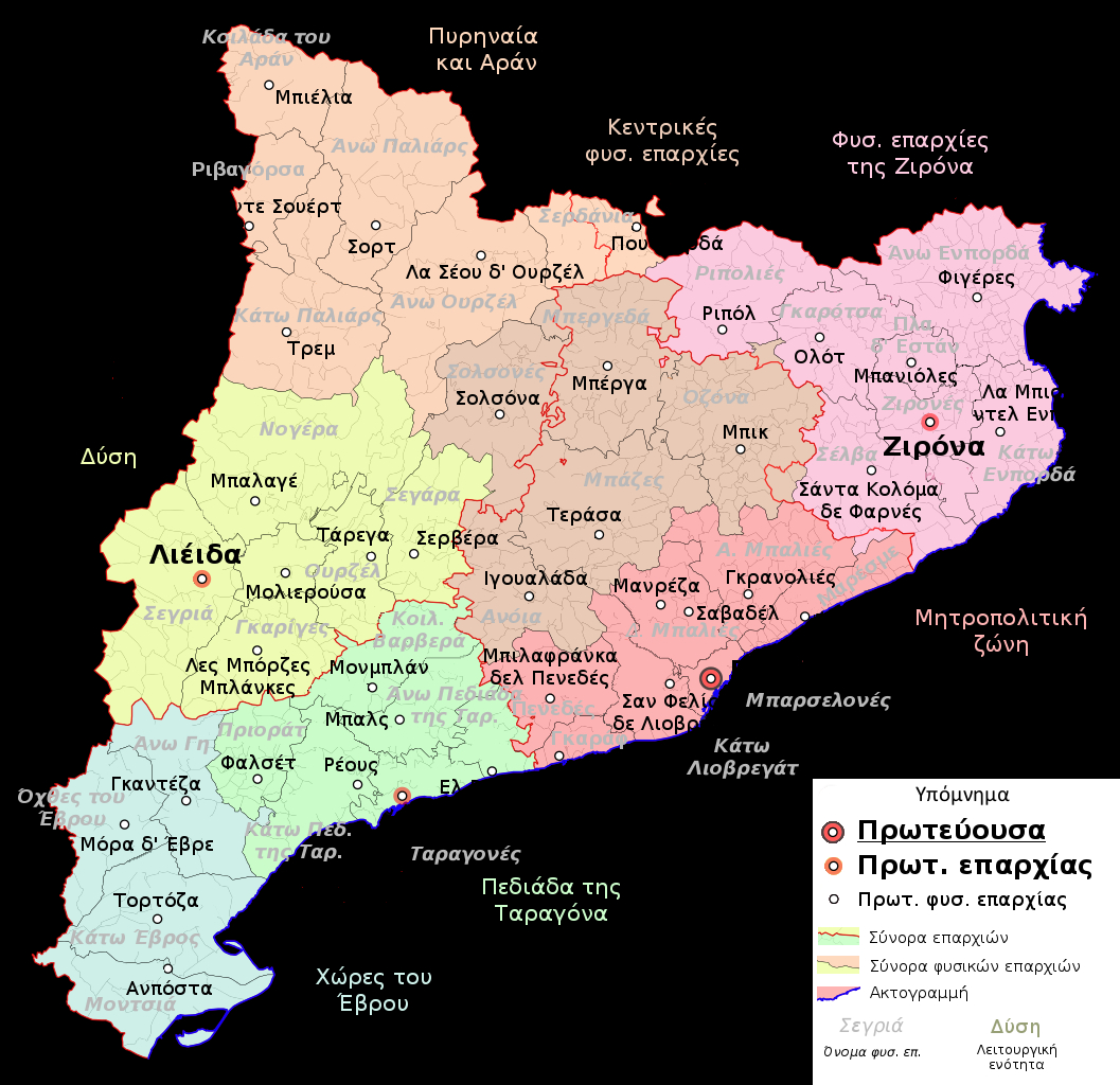 Χάρτης της διοικητικής δομής της Καταλονίας με τις επαρχίες, τις φυσικές επαρχίες και τις λειτουργικές ενότητες με τις αντίστοιχες πρωτεύουσές τους.